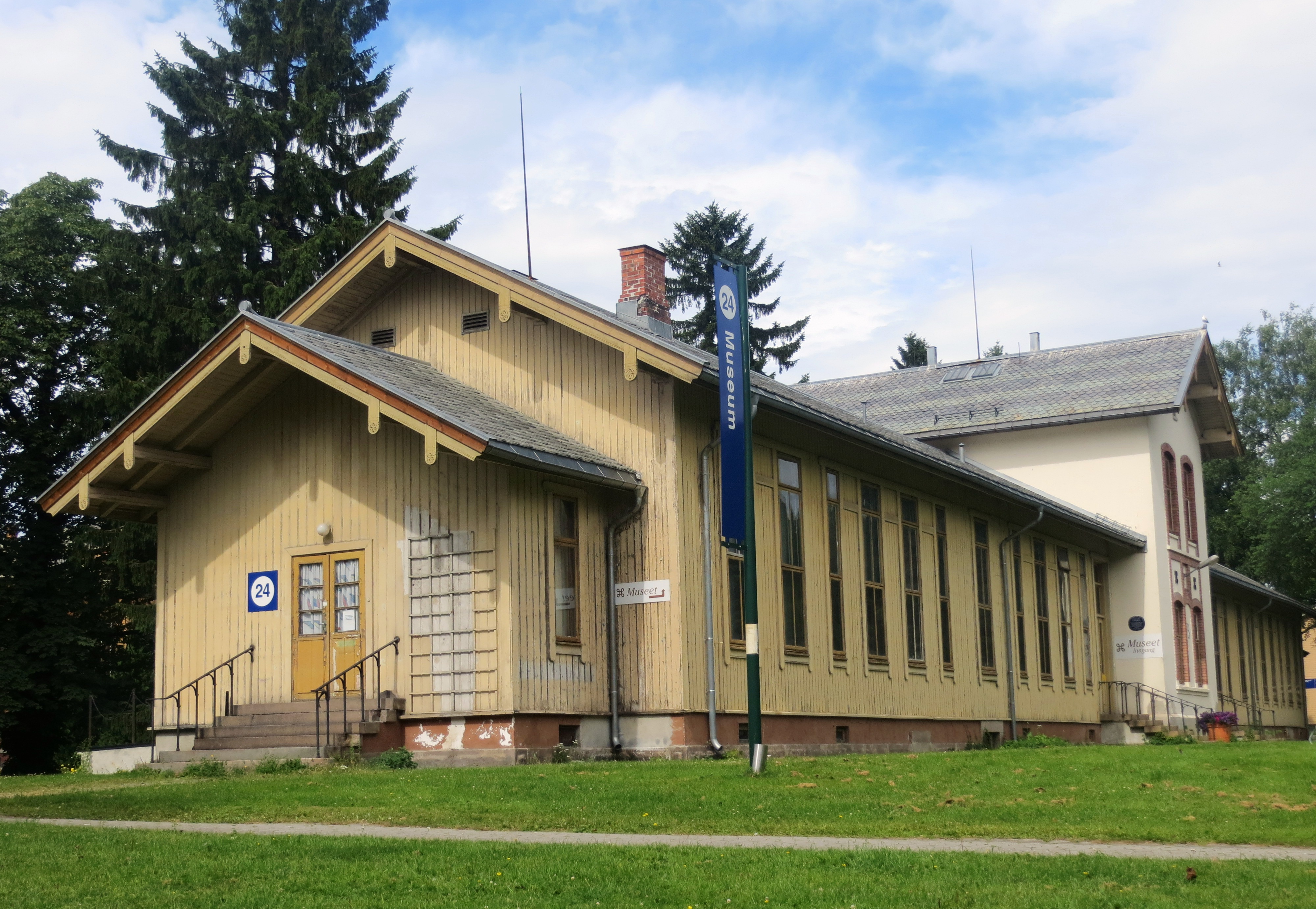 Epidemilasarettet (1887) ved Ullevål Sykehus, Oslo